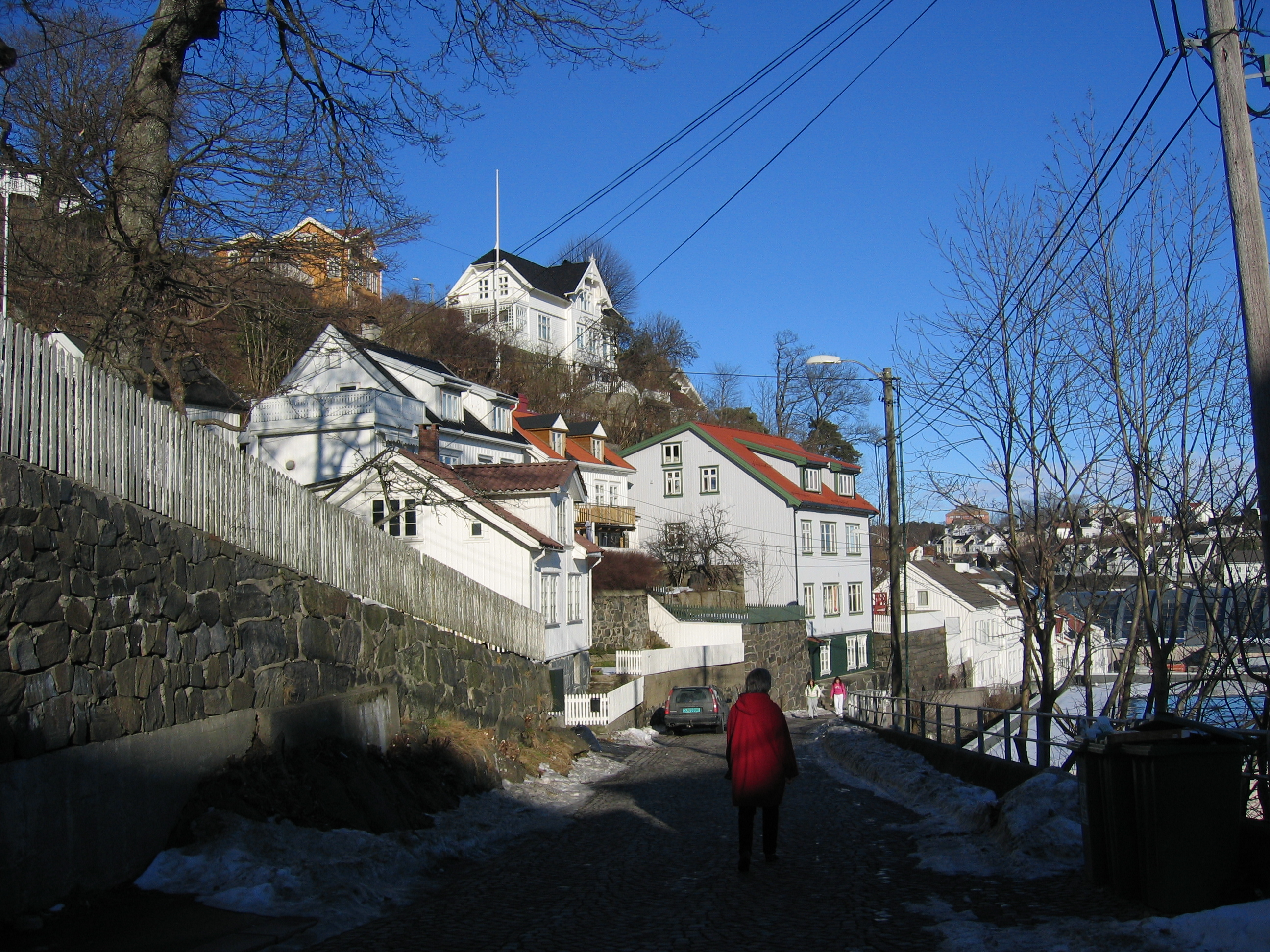 Strømsbuveien i Arendal.